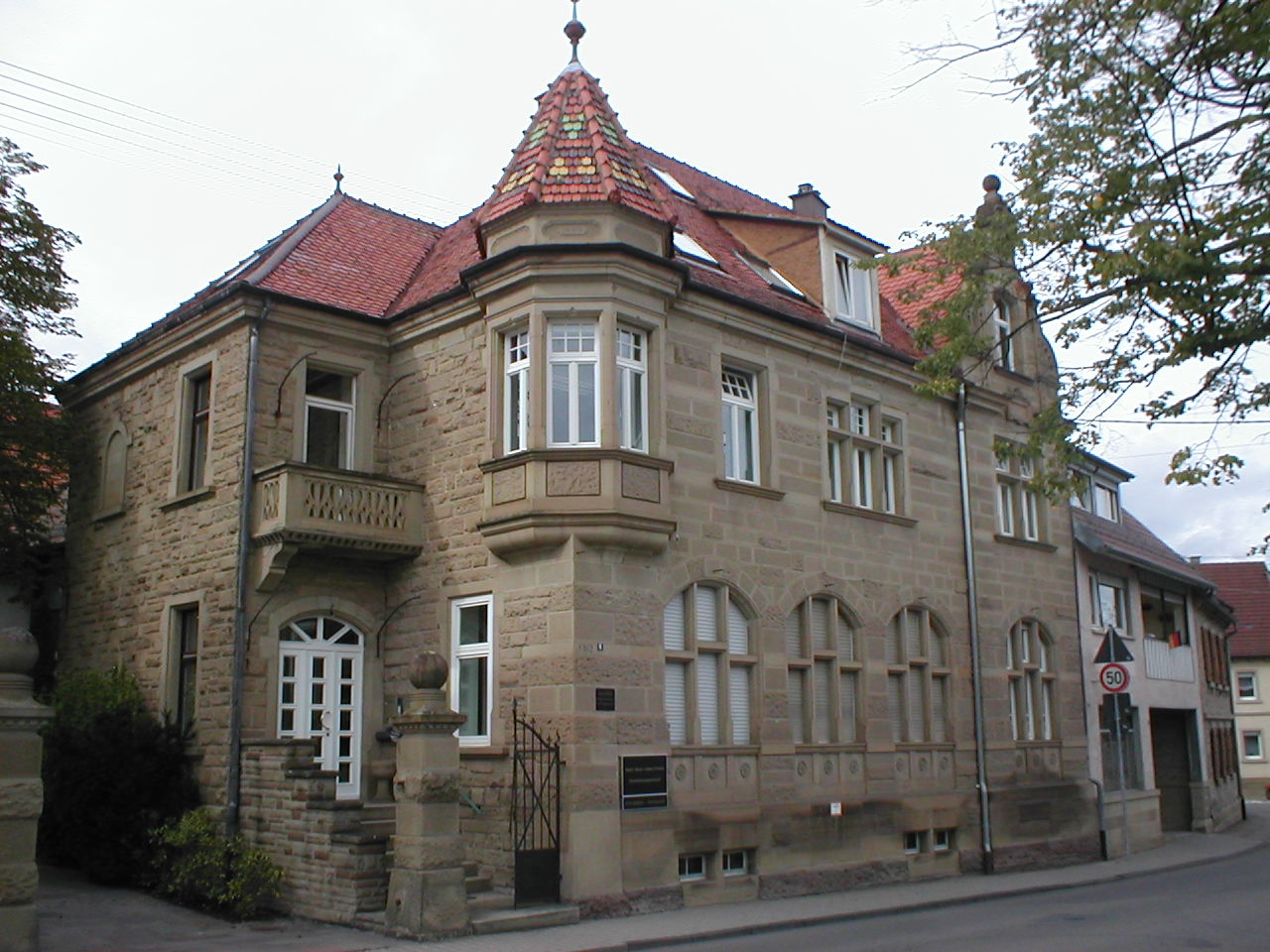 Stadtvilla, erbaut 1906 aus regionalem Sandstein Hauptstraße 6, gegenüber dem Rathaus, in Eppingen-Mühlbach